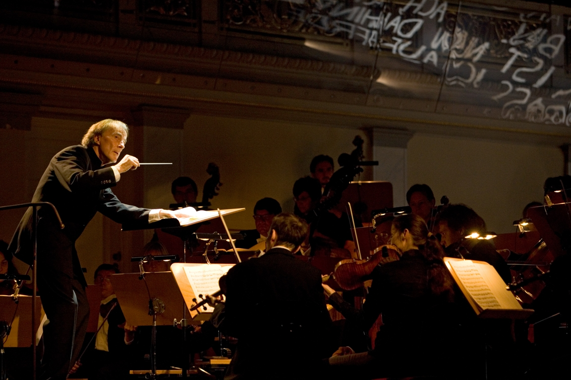 Lothar Zagrosek dirigiert Orfeo ed Euridice im Konzerthaus Berlin